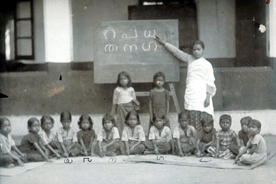 മണലിലെഴുത്ത്